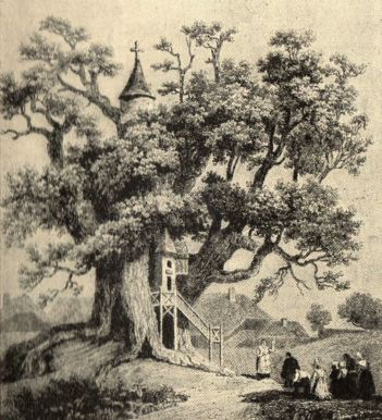 Chêne d'allouville belfosse, gravure du 18ème siècle